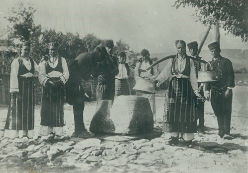 Снимка на младежи и девойки в народни носии около кладенец в с. Ново село (Дългопол), Варненско